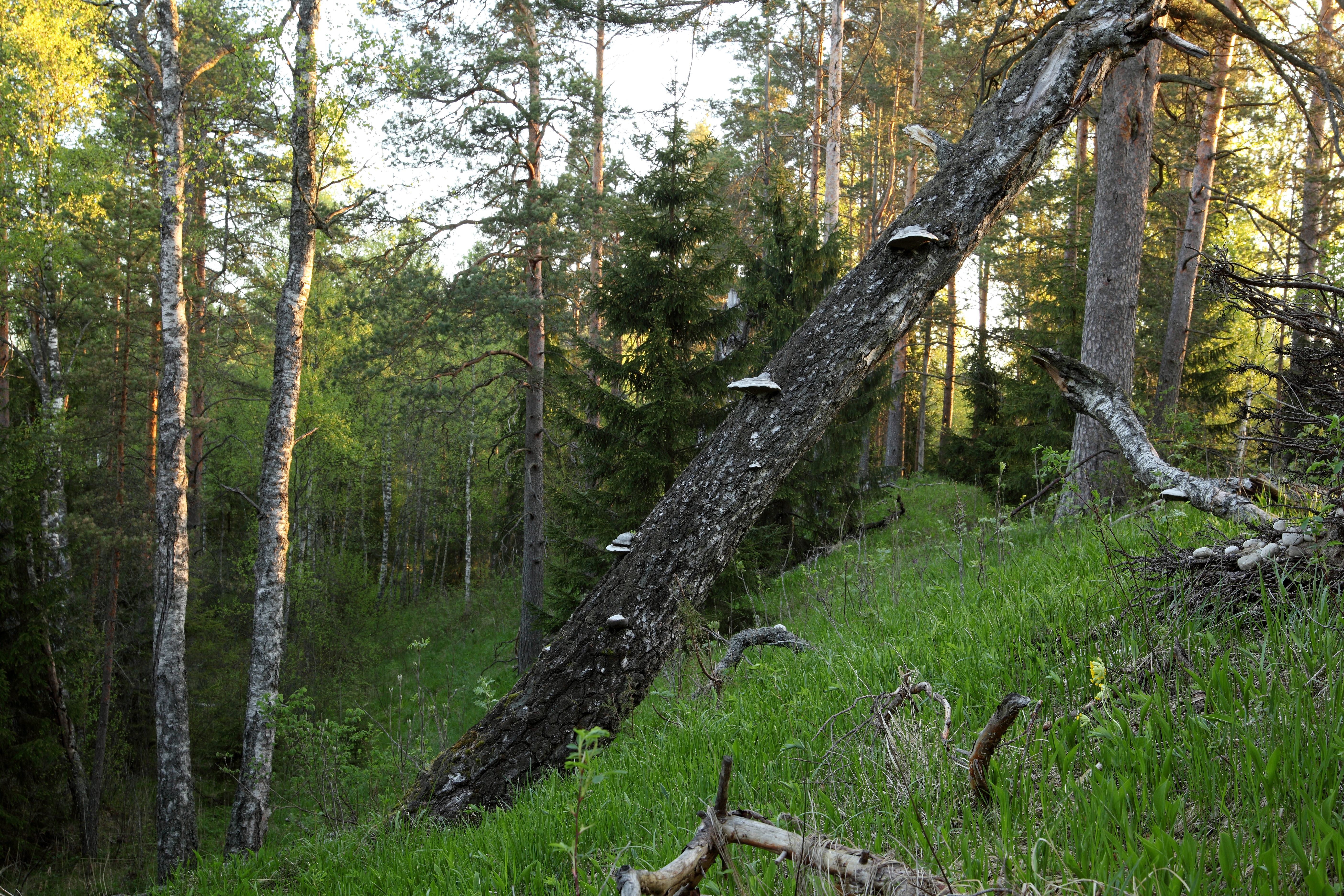 Vulbi oos Vulbi maastikukaitsealal.